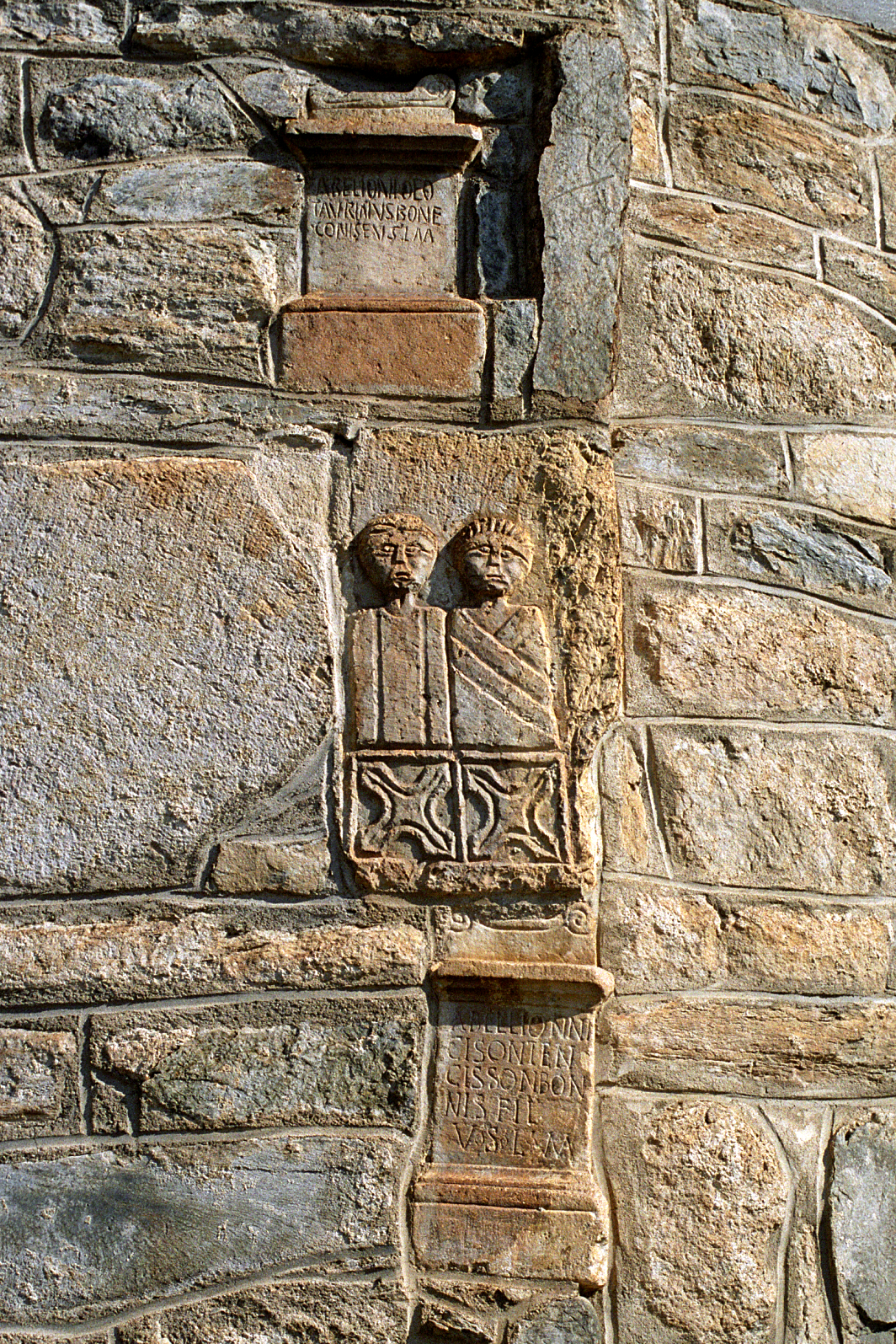 Remplois antiques à l'église de Saint-Aventin (Haute-Garonne, France).